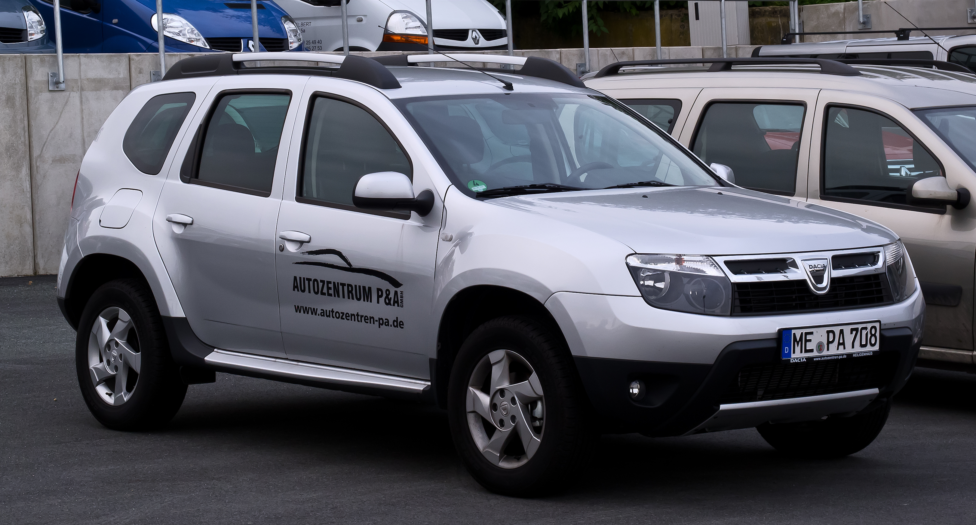 Dacia Duster 105 4x4 Prestige